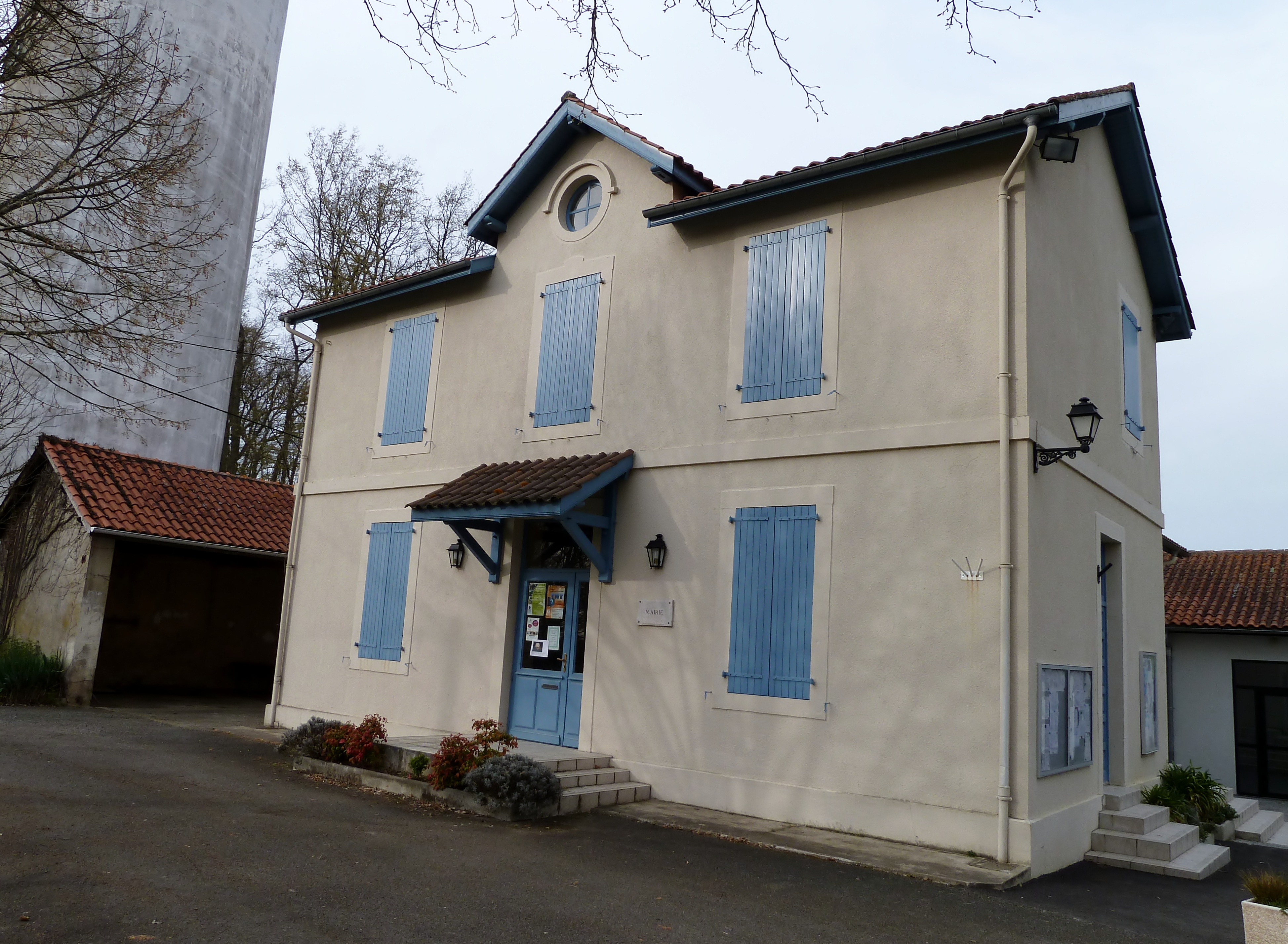 Mairie de Castetpugon vue de face